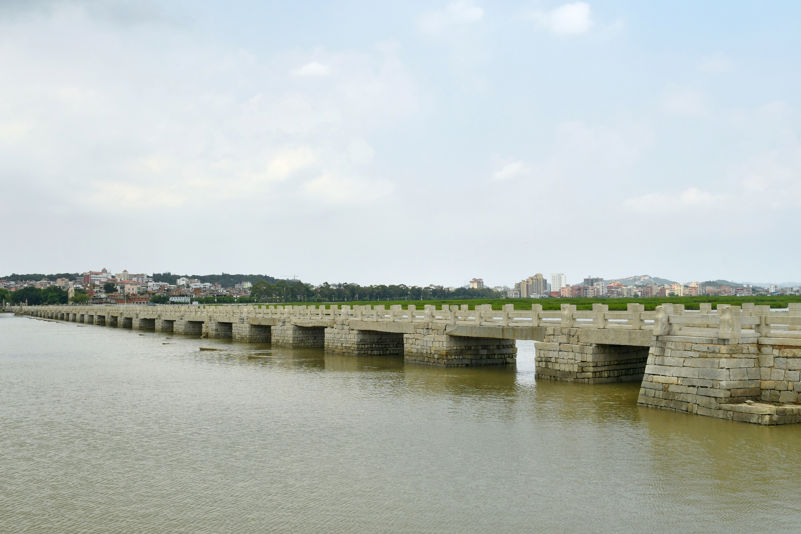 泉州洛阳桥（又名万安桥）上游方向一侧